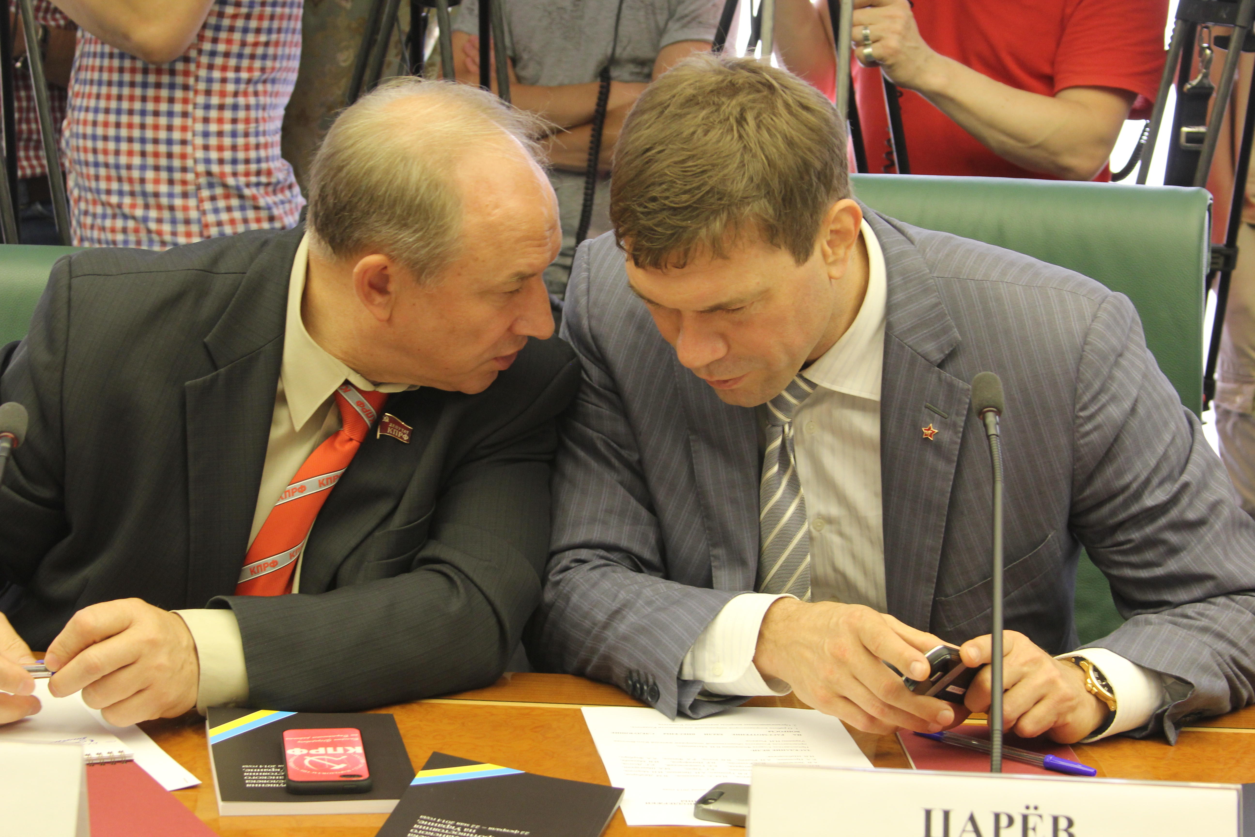 О.А.Царев и В.Ф.Рашкин на заседании Комитета общественной поддержки жителей Юго-Востока Украины